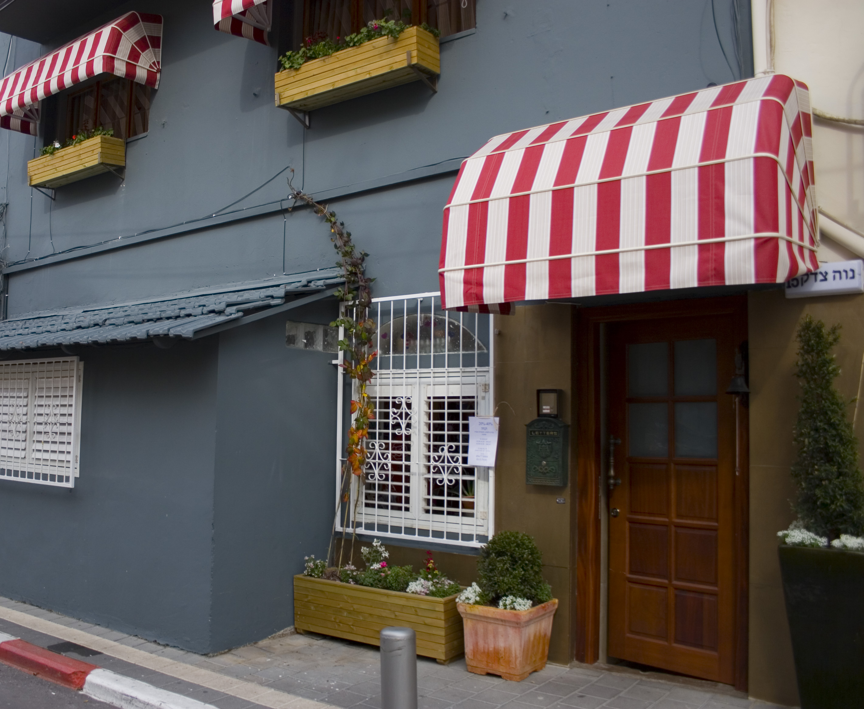 A shop in Newe Zedek, Tel-Aviv. Neve Tzedek